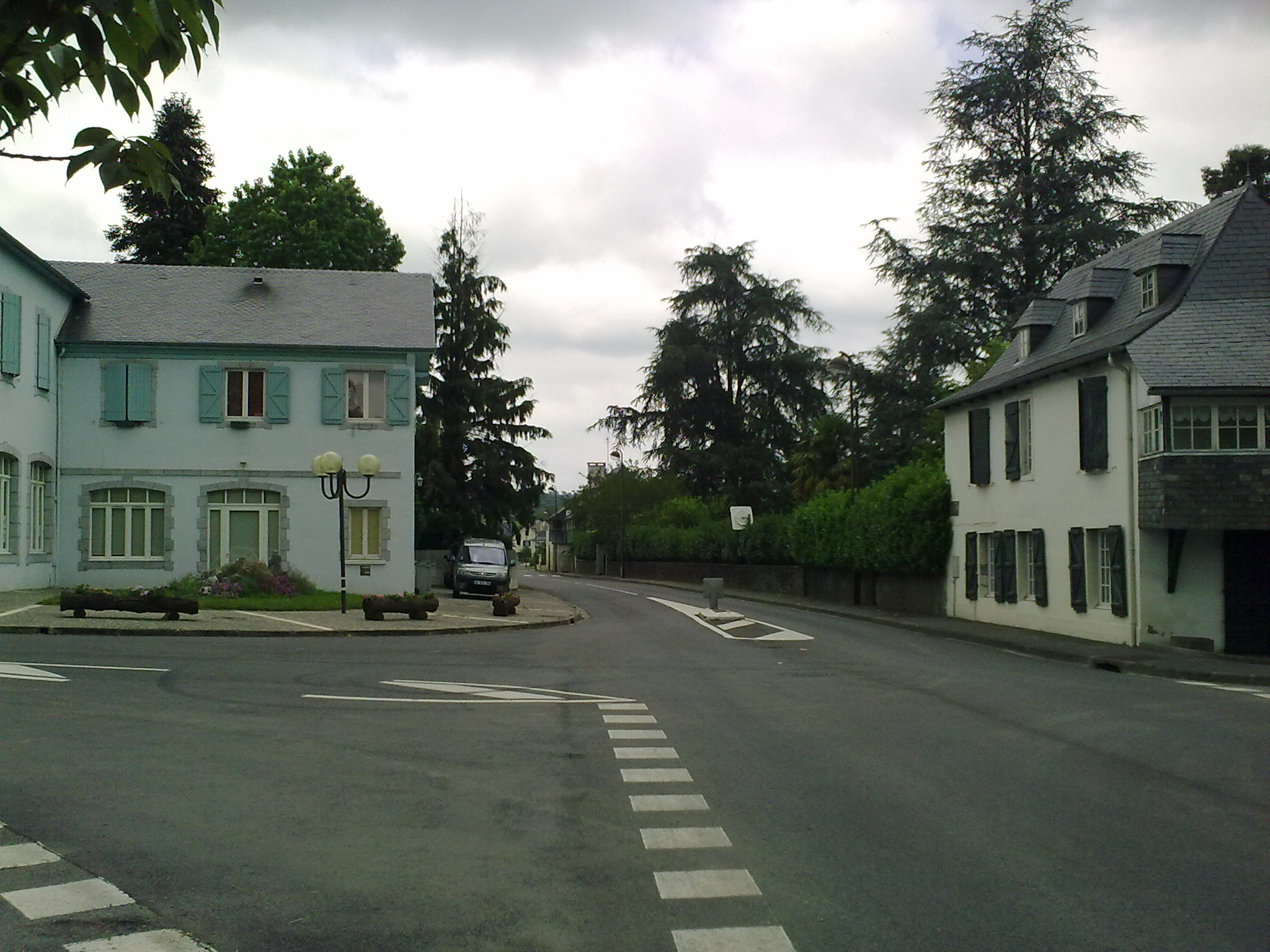 Féas le 4 juillet 2010.